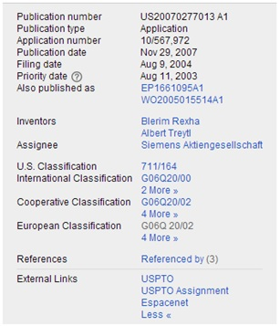 Hulumtimi i patentuar në Amerikë